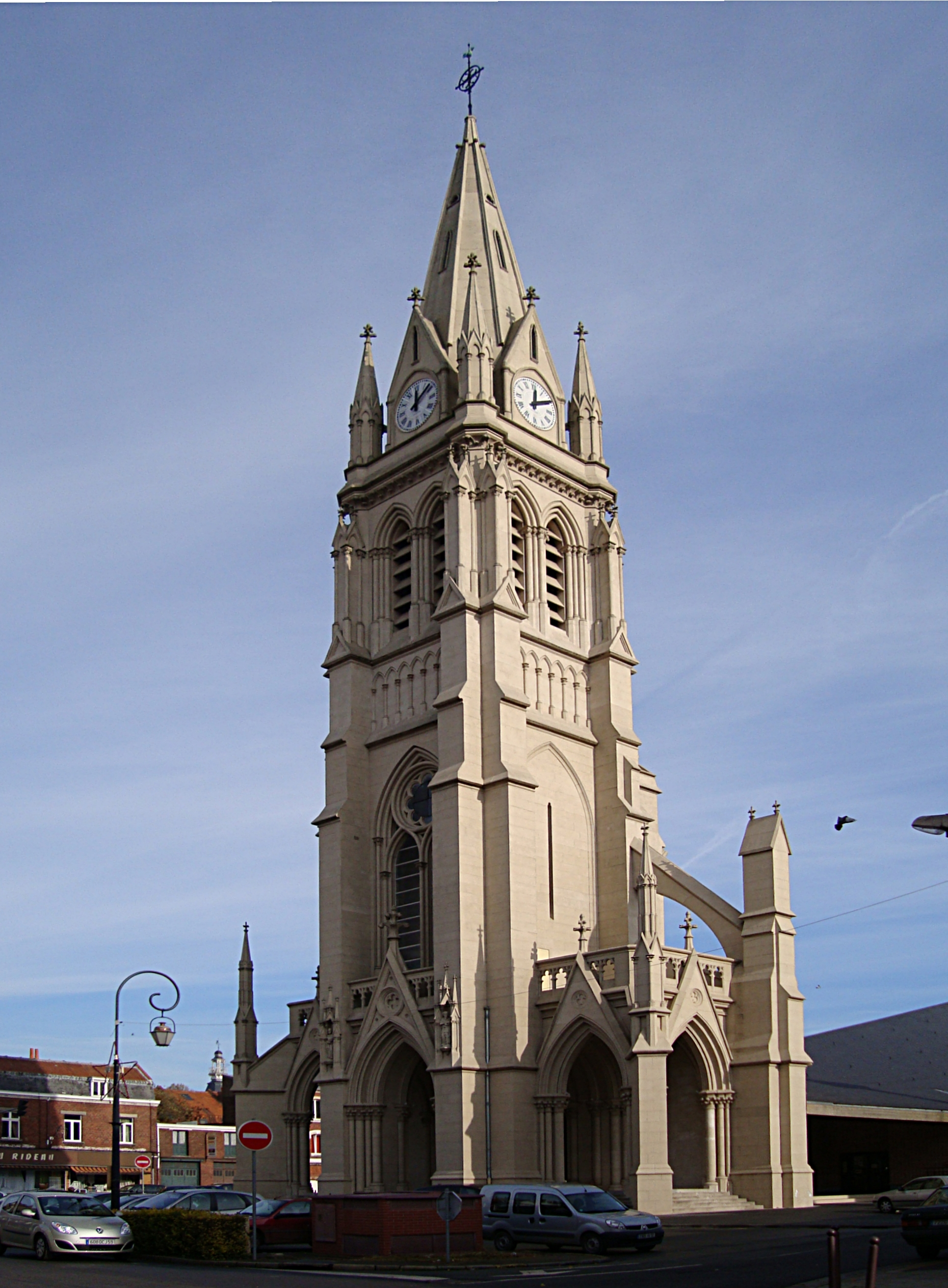 Le clocher de l'église Saint-Vaast de La Bassée (Nord), construit dans les années 1920.